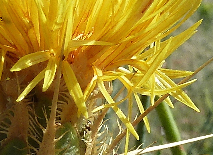 Centaurea ornata - Detalle de los flósculos periféricos neutros, con corola de 4-5 lobulos algo desiguales - circa Estación FFCC RENFE/ADIF de contenedores de Abroñigal/Embajadores (Madrid, España).